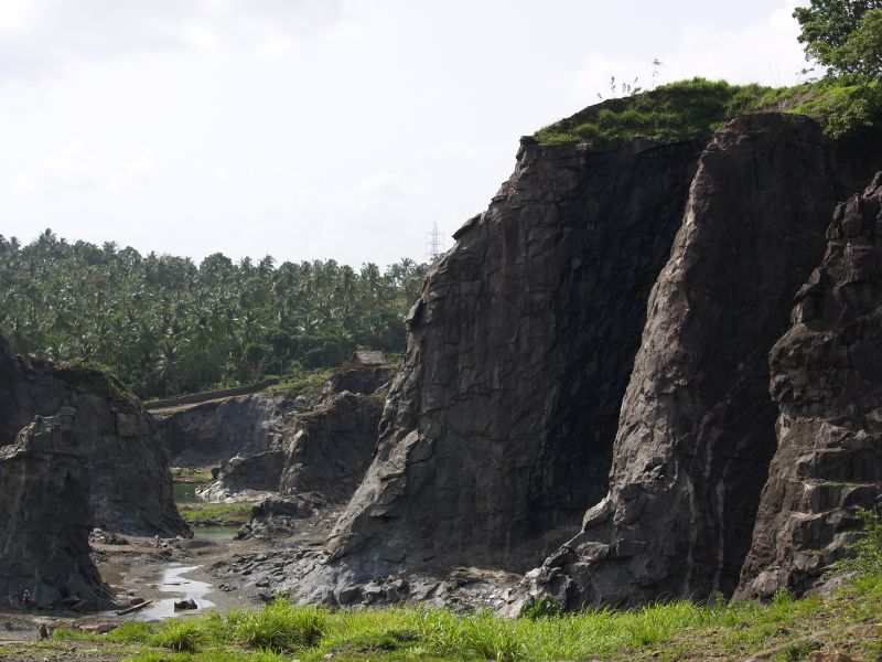 Quarry Mongam Malappuram